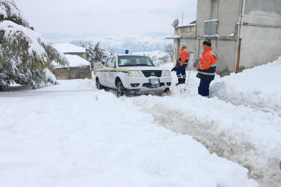 Assistenza ai cittadini della comunita' di Grassano durante l'emergenza neve di febbraio 2012.